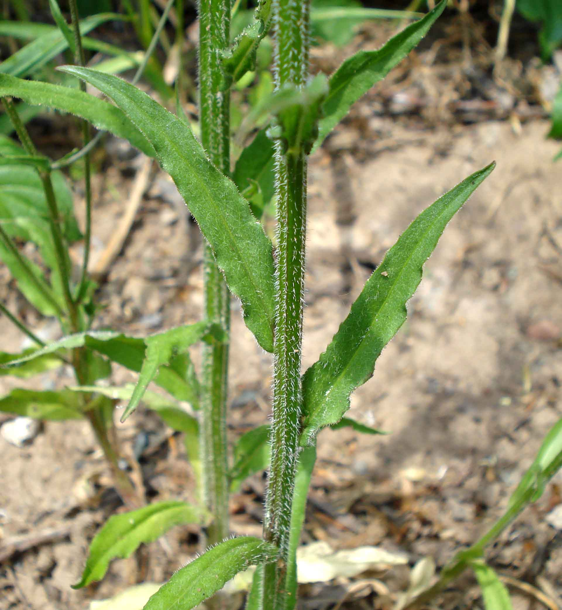 Campanula rapunculus (Unterfranken, Germany)